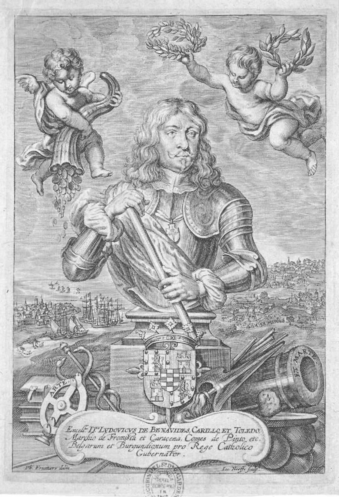 Retrato de Luis de Benavides Carrillo de Toledo, grabado a buril, 206 x 143 mm, Madrid, Biblioteca Nacional de España